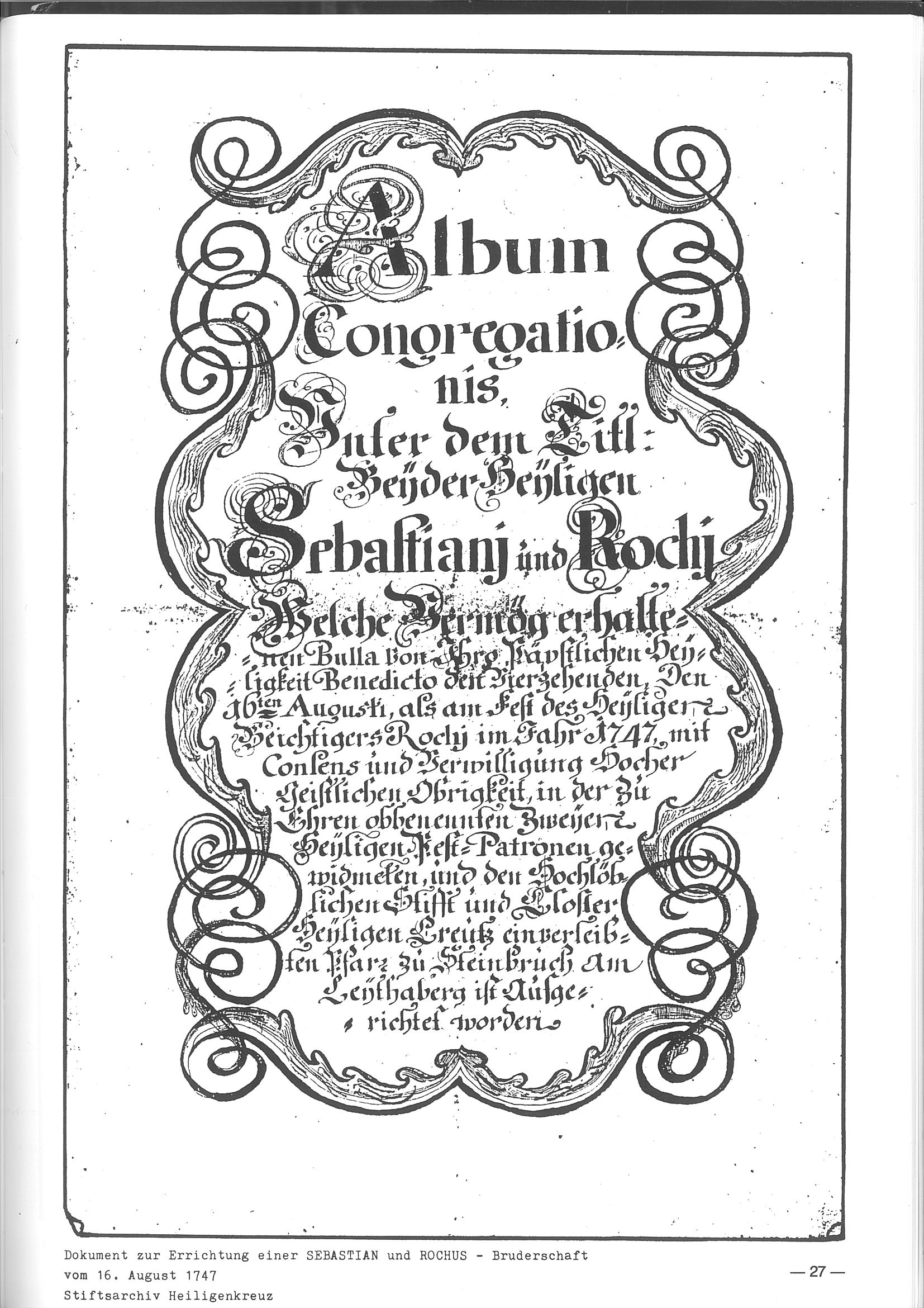 Dokument zur Errichtung einer Sebastian- und Rochus-Bruderschaft vom 16. August 1747 in Kaisersteinbruch (der Name wurde oft verändert)